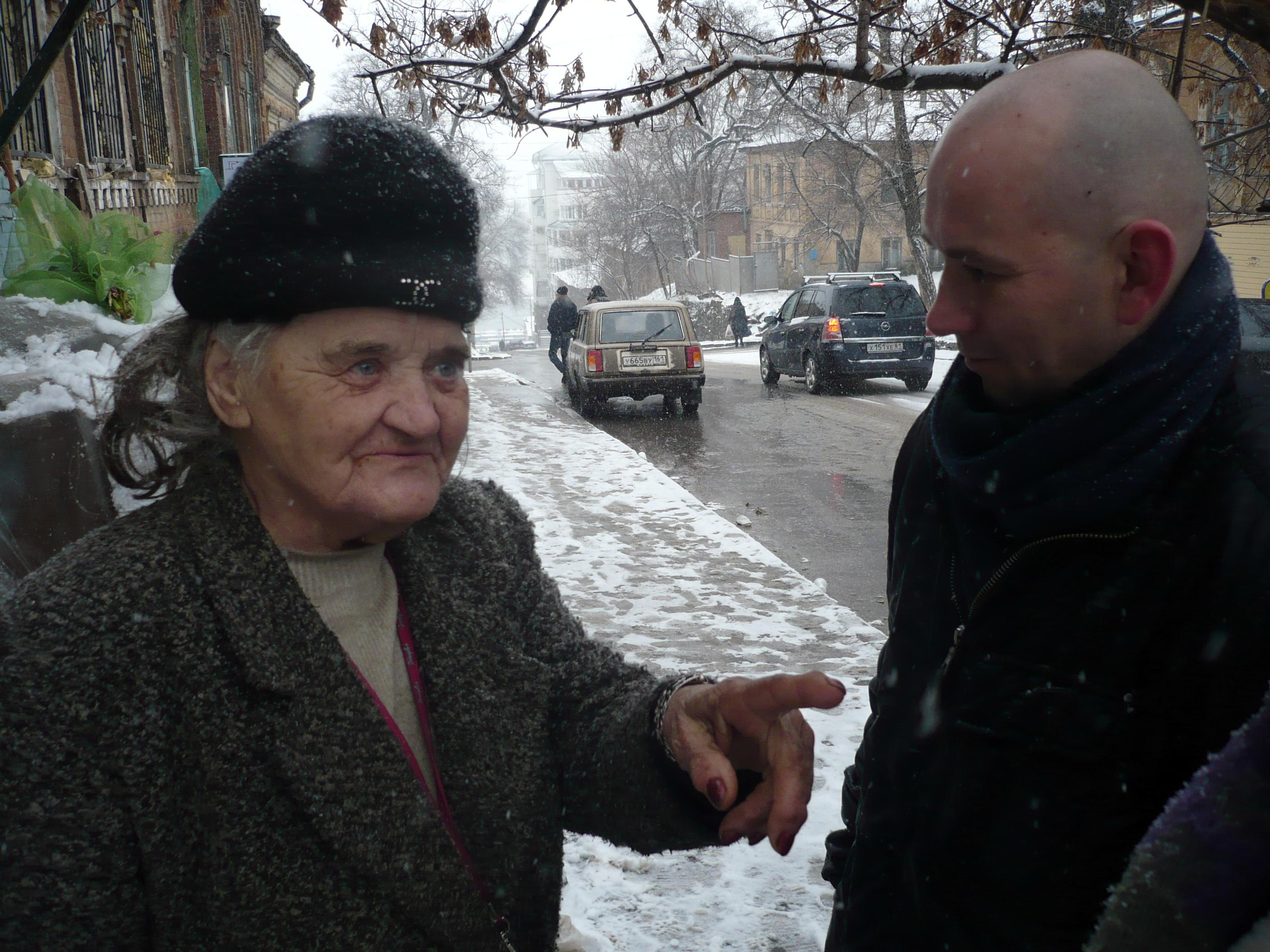 Художник Эльфрида Павловна Новицкая и кинорежиссёр Александр Расторгуев, Ростов-на-Дону, 2010 год